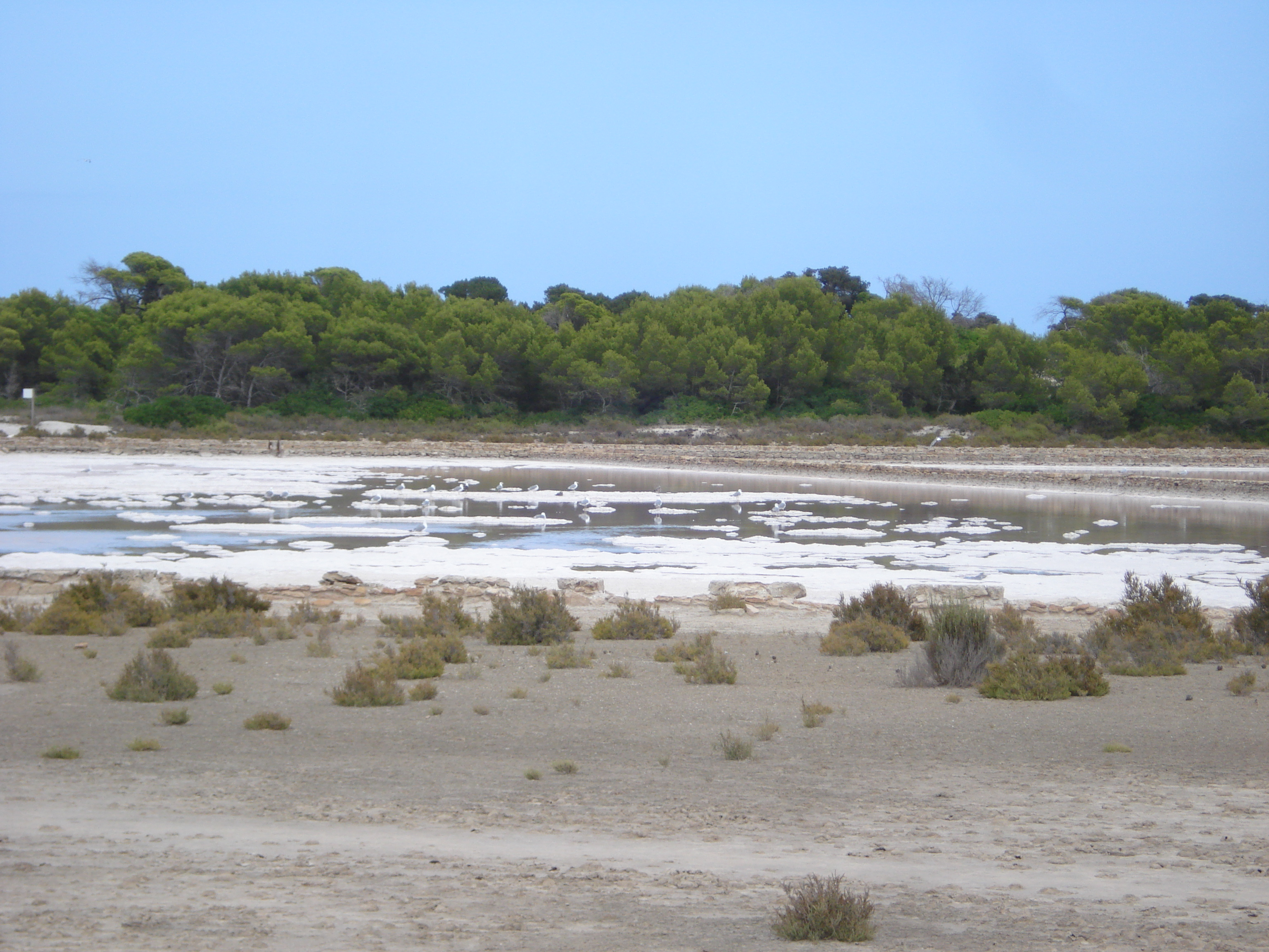 Ses Salines d'Eivissa i Formentera This is a photography of a Special Area of Conservation in Spain with the ID: ES0000084. Natura2000 entry, EEA entry